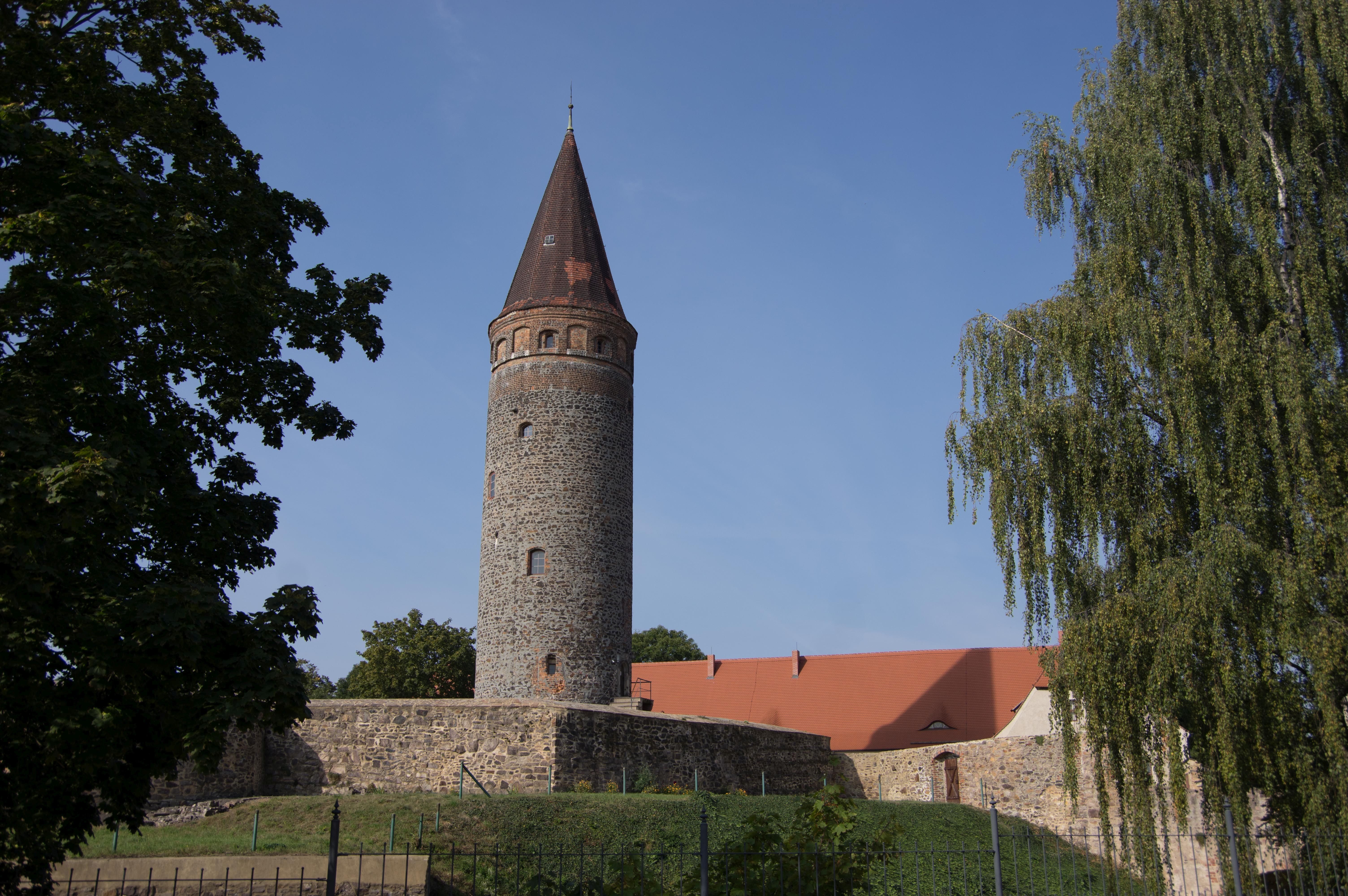 Zörbig in Sachsen-Anhalt. Der Turm der Burg, diese steht unter Denkmalschutz.